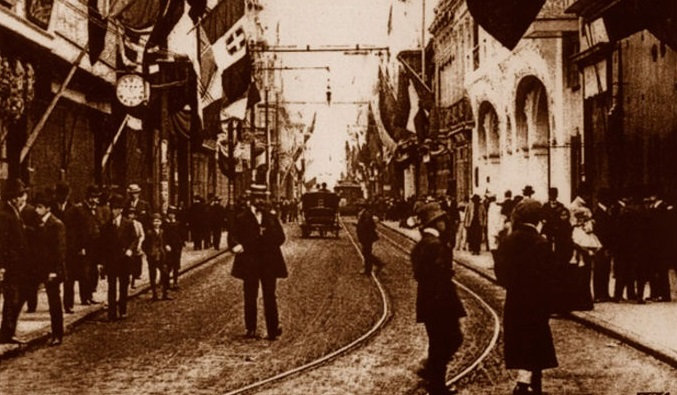 Los Italianos en Lima 1905